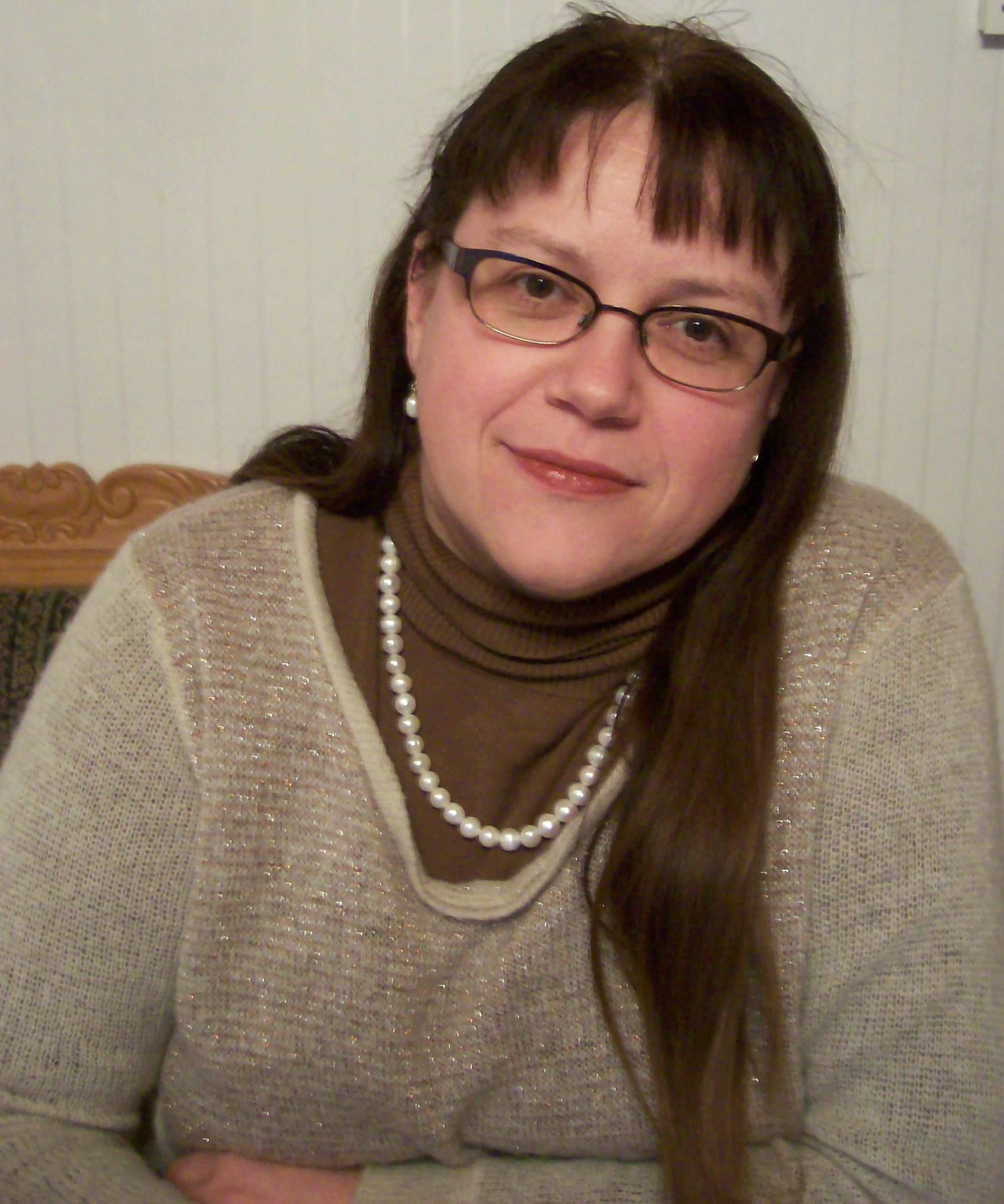 Prof. Annemarie C. Mayer